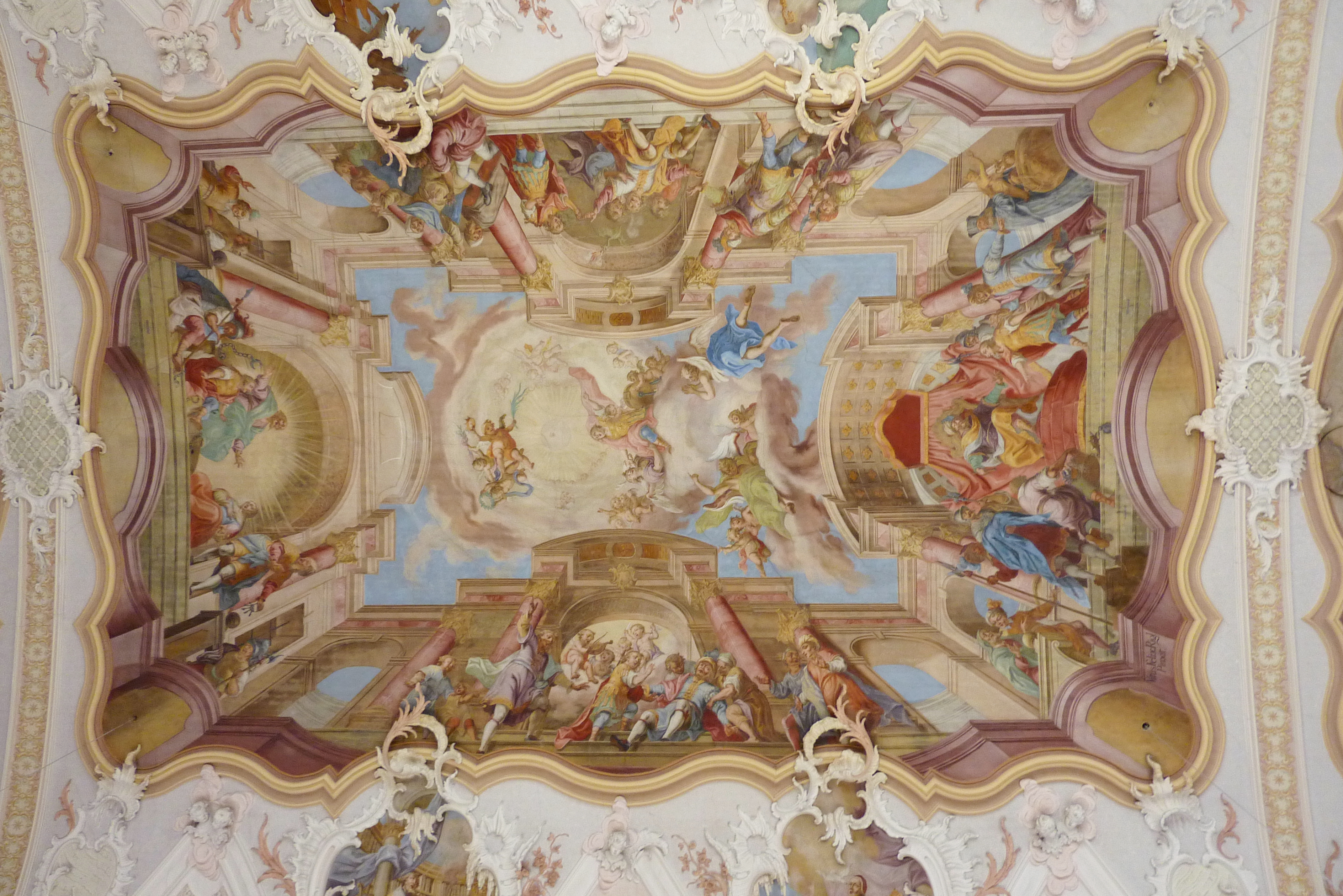 St. Vitus in Donaualtheim (Dillingen an der Donau), mittleres Deckenfresko des Langhauses mit Szenen aus dem Leben des hl. Vitus. Seitliche Darstellungen: der hl. Vitus mit seinen Pflegeeltern Modestus und Kreszentia im Gefängnis, die Heilung des besessenen Sohnes des Kaisers Diokletian durch den hl. Vitus, die Verurteilung des hl. Vitus, der Tod seines Vaters. In der Mitte: die Verklärung des hl. Vitus. Das Bild trägt die Signatur VITUS FELIX RIGL PINXIT (Vitus Felix Rigl malte es).